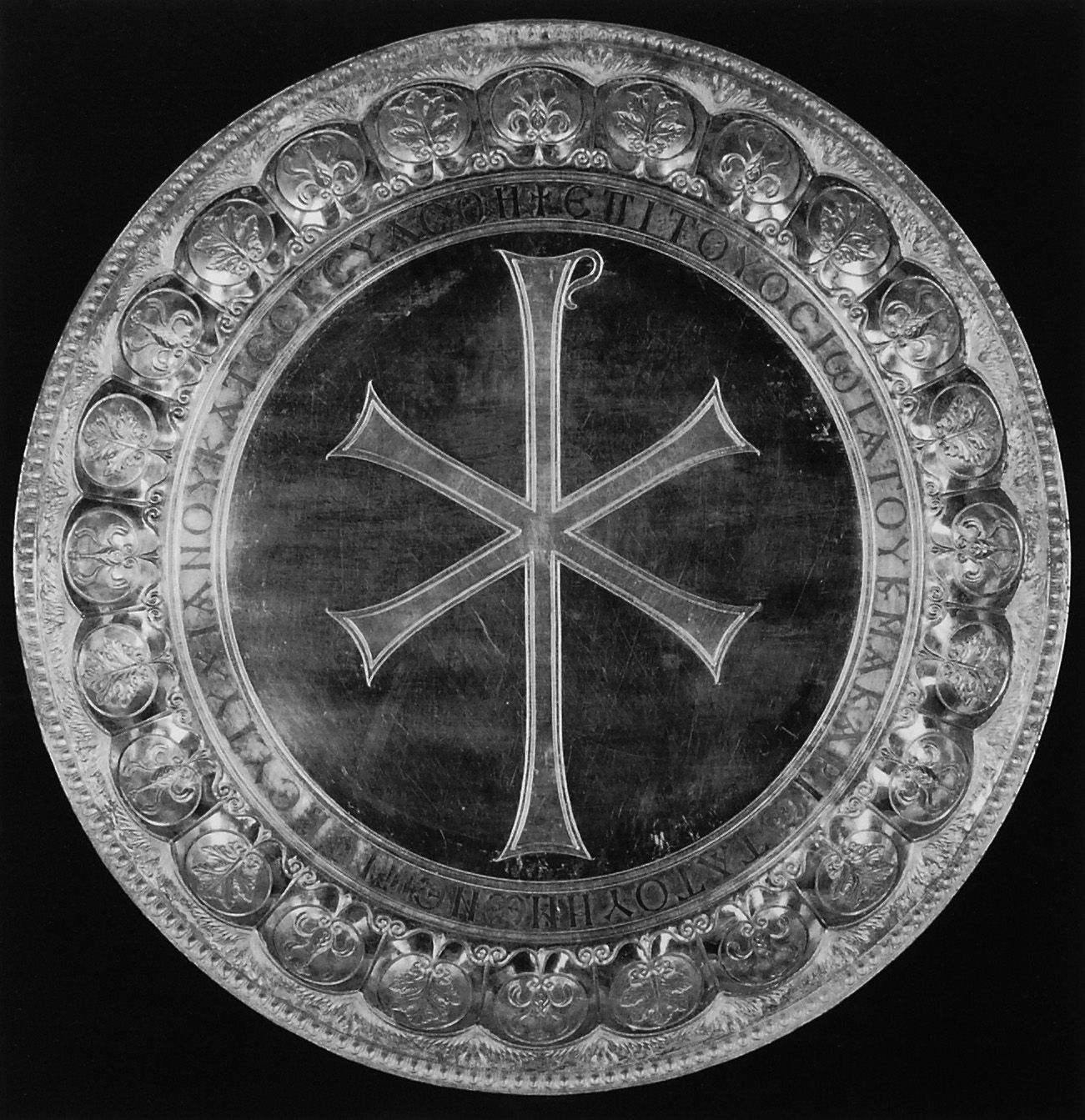 Silberne Patene aus dem Sion-Schatz. 6th century A.D.